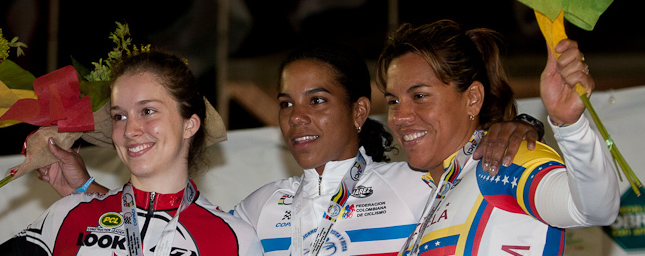 El podio de la velocidad individual femenina Campeonato Panamericano de Ciclismo de Pista, Medellín. 4 de mayo de 2011.